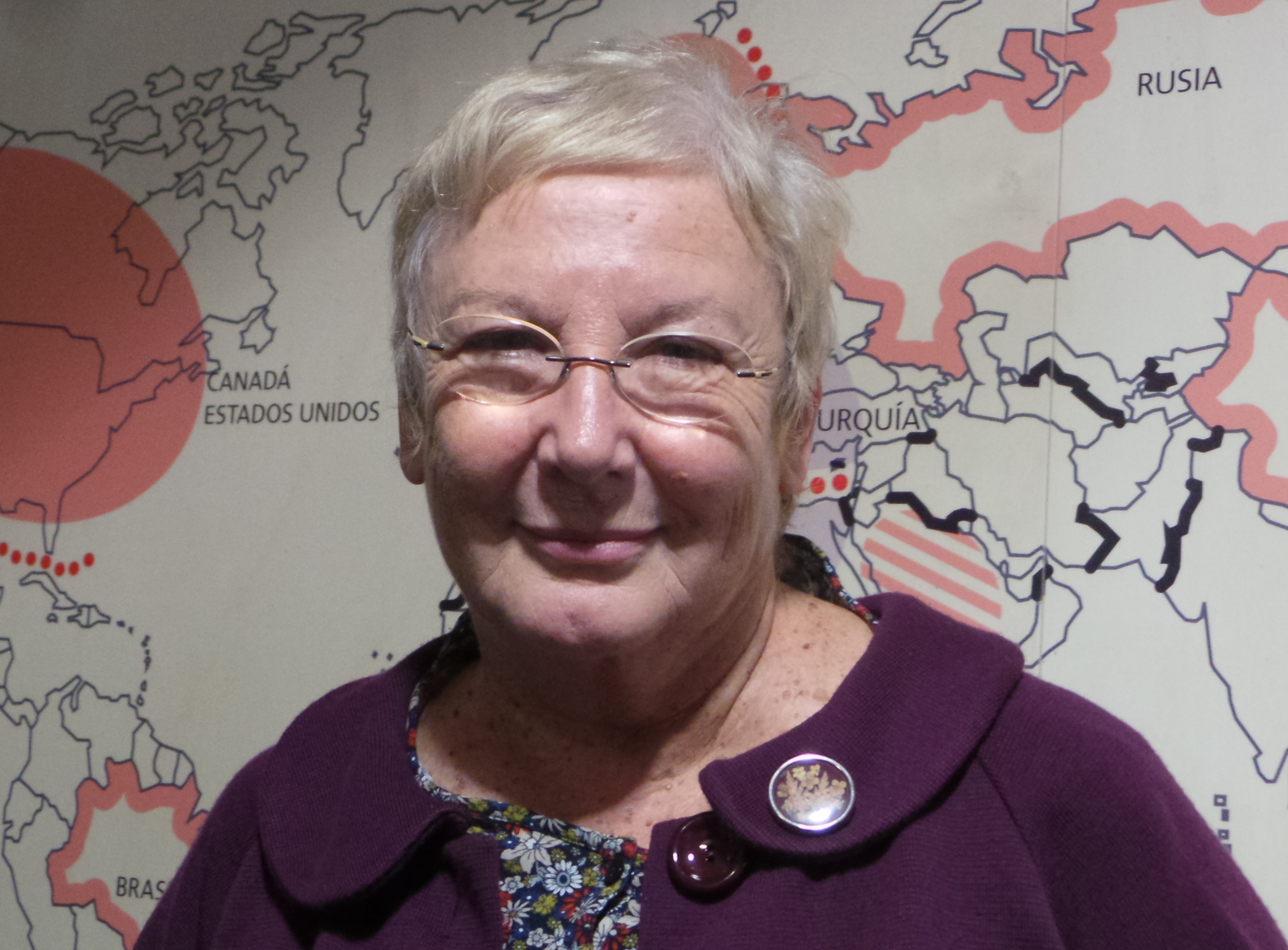 Teresa Aranguren en Madrid, noviembre de 2016